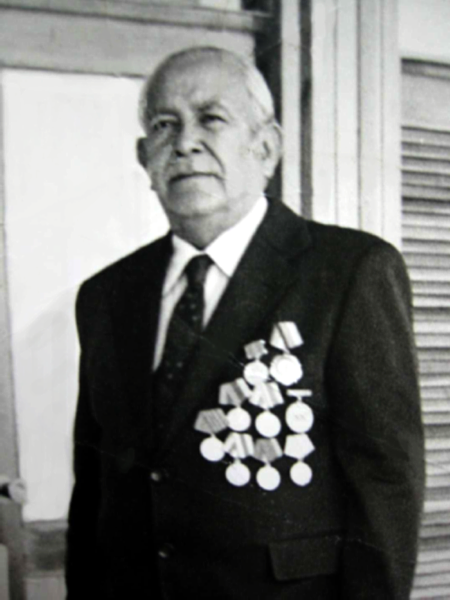 Ursinio Rojas a los 70 años, en Holguin.